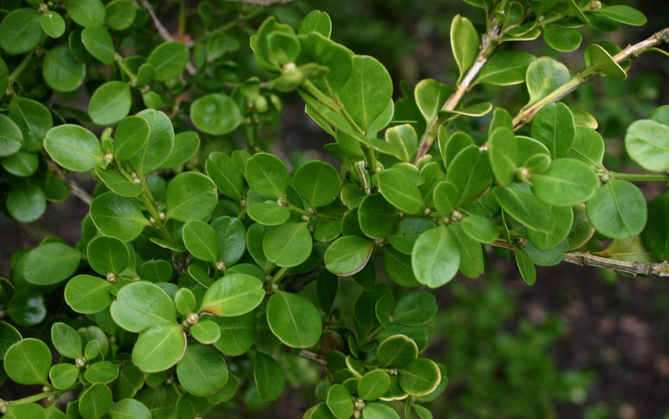 Buxus sinica (syn. Buxus microphylla var. sinica): Leaves